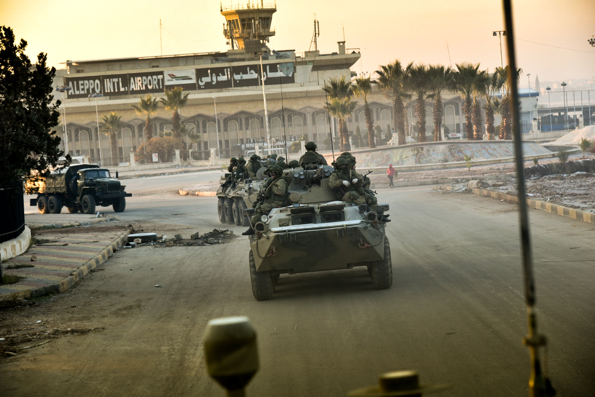 Работа сапёров Международного противоминного центра Министерства обороны России в Алеппо (Сирия)